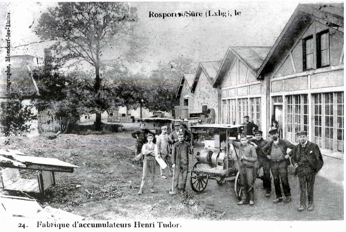 D'Fabrique d'accumulateurs Henri Tudor zu Rouspert.